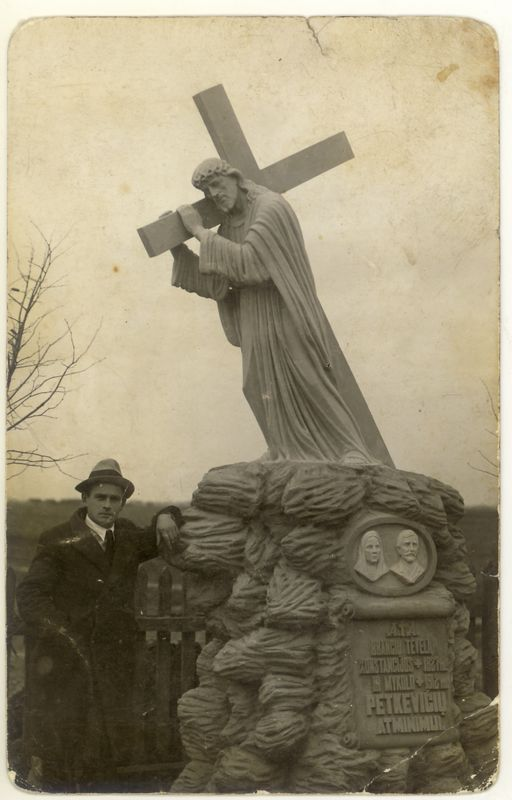 Sculptor Benjaminas Jakševičius next to the monument to Konstancija and Mykolas Petkevičius